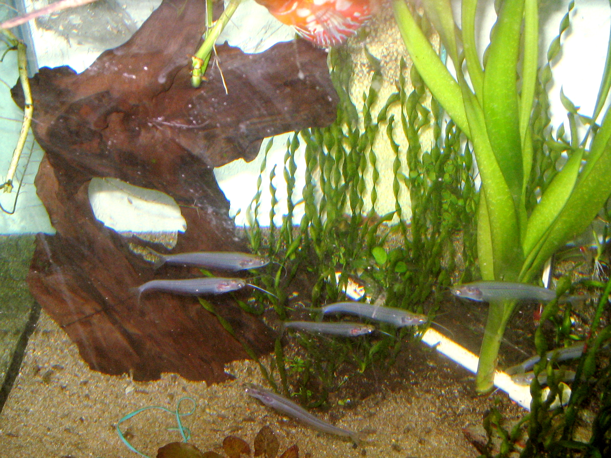 Kryptopterus bicirrhis This is Kryptopterus vitreolus.